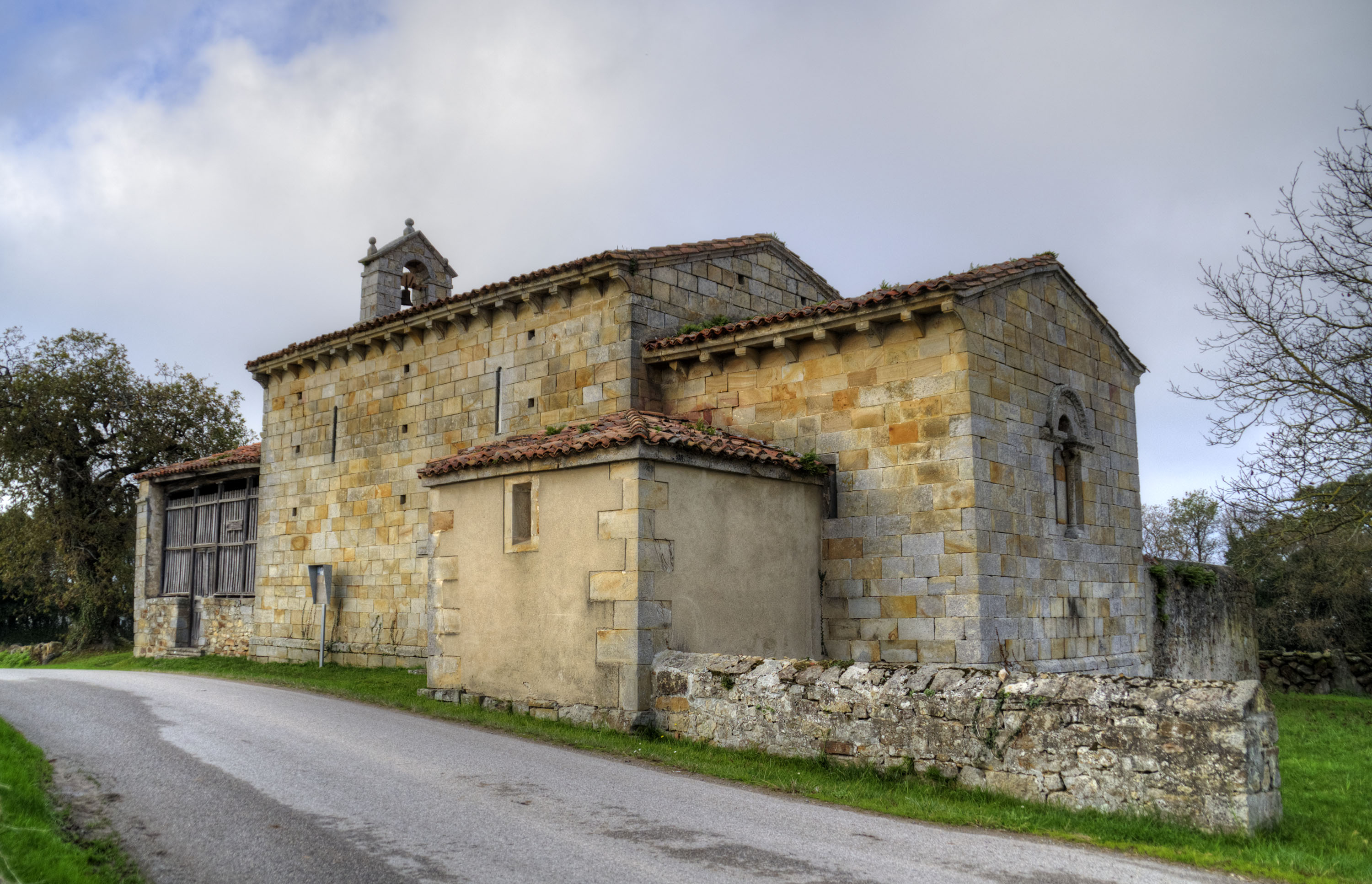 Construida en la primera mitad del siglo XIII, esta iglesia está en la Lloraza, concejo de Villaviciosa, Asturias. La puerta occidental está protegida por el pórtico que se ve a la izquierda de la imagen. Al encontrarlo cerrado y tener espacios muy estrechos entre las maderas no pude fotografiarla.